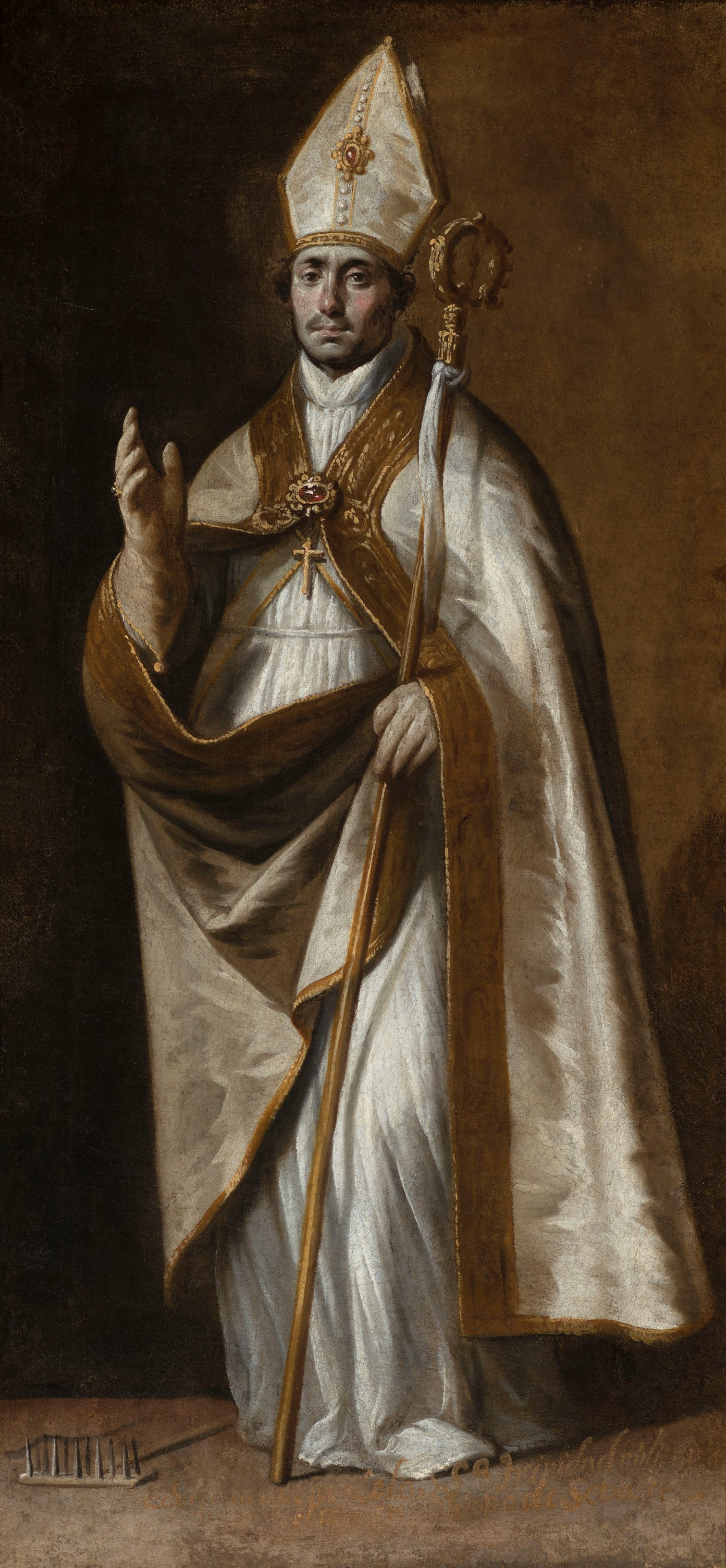 La obra representa al médico y obispo San Blas.